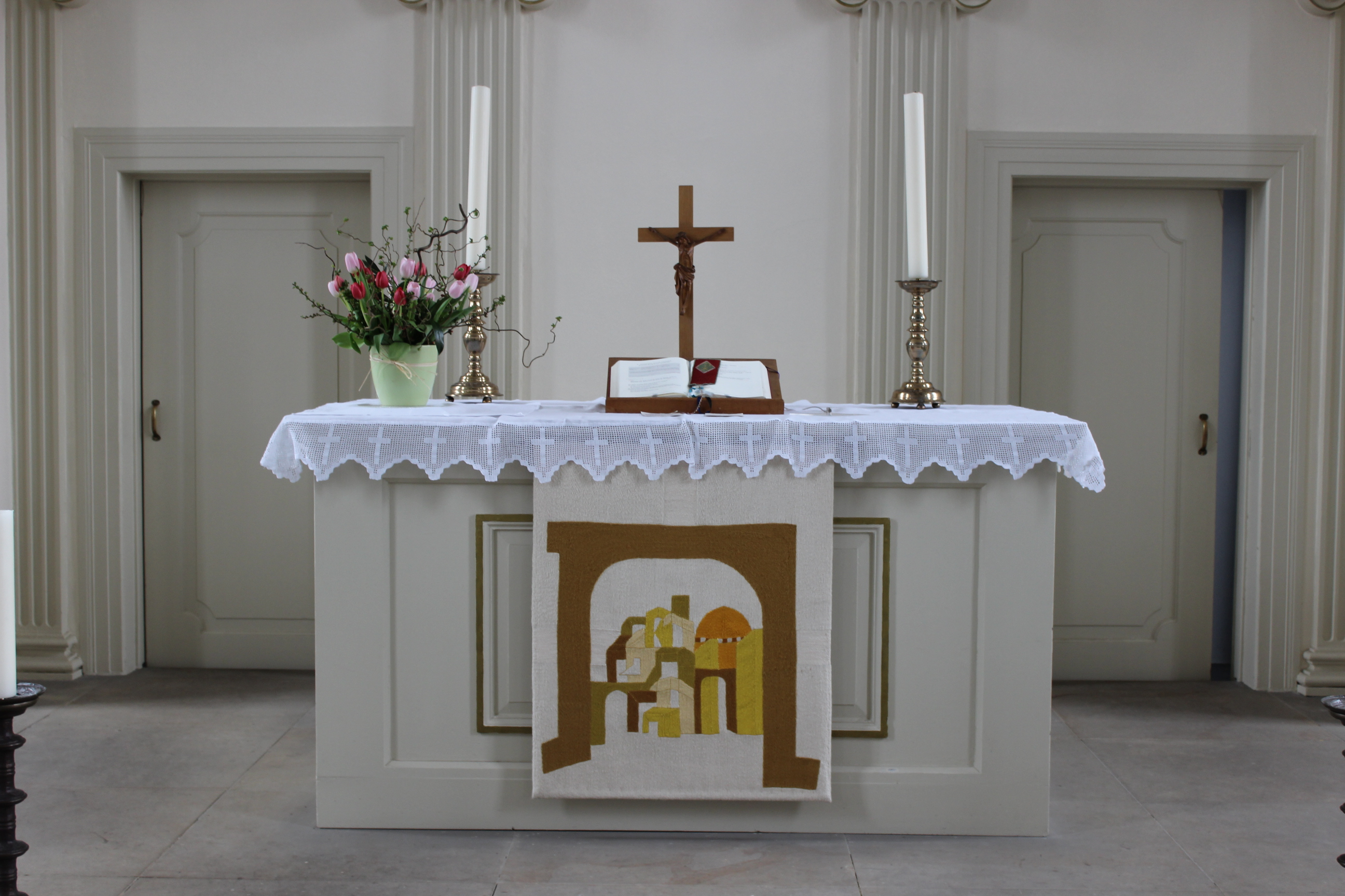 Kanzel der St. Michaeliskirche (Bienenbüttel)